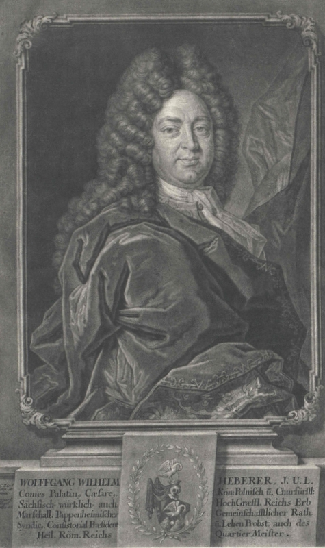 Heberer, Wolfgang Wilhelm (ca.1675 – 1721), Königl.-Polnischer und Kurfürstlich.-Sächsischer sowie Hofgräflicher Pappenheimischer Rat, Syndicus, Konsistorialpräsident u. Lehensprobst sowie Reichsquartiermeister des Heiligen Römischen Reichs